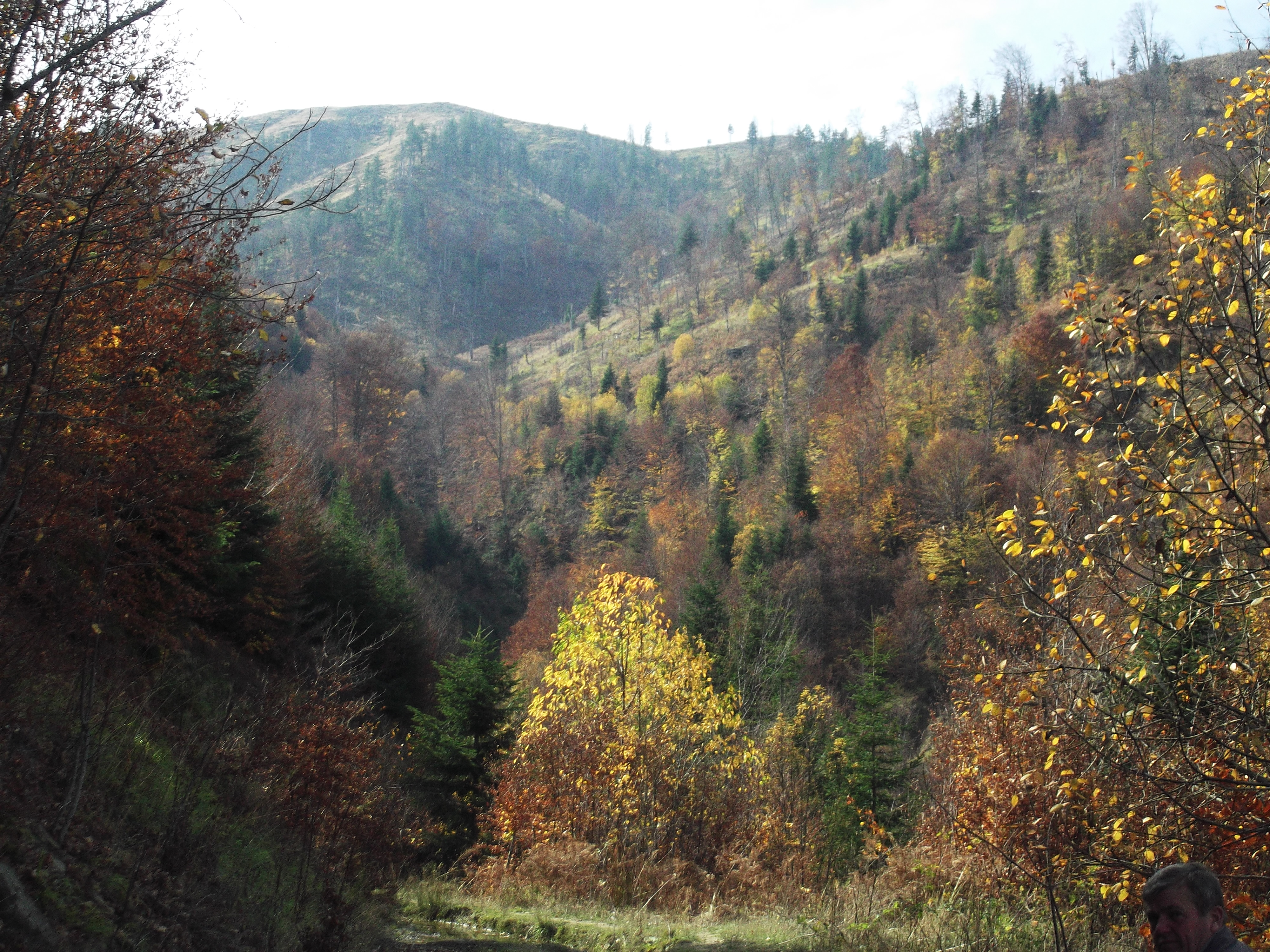 Guri i Nikes, Pogradec